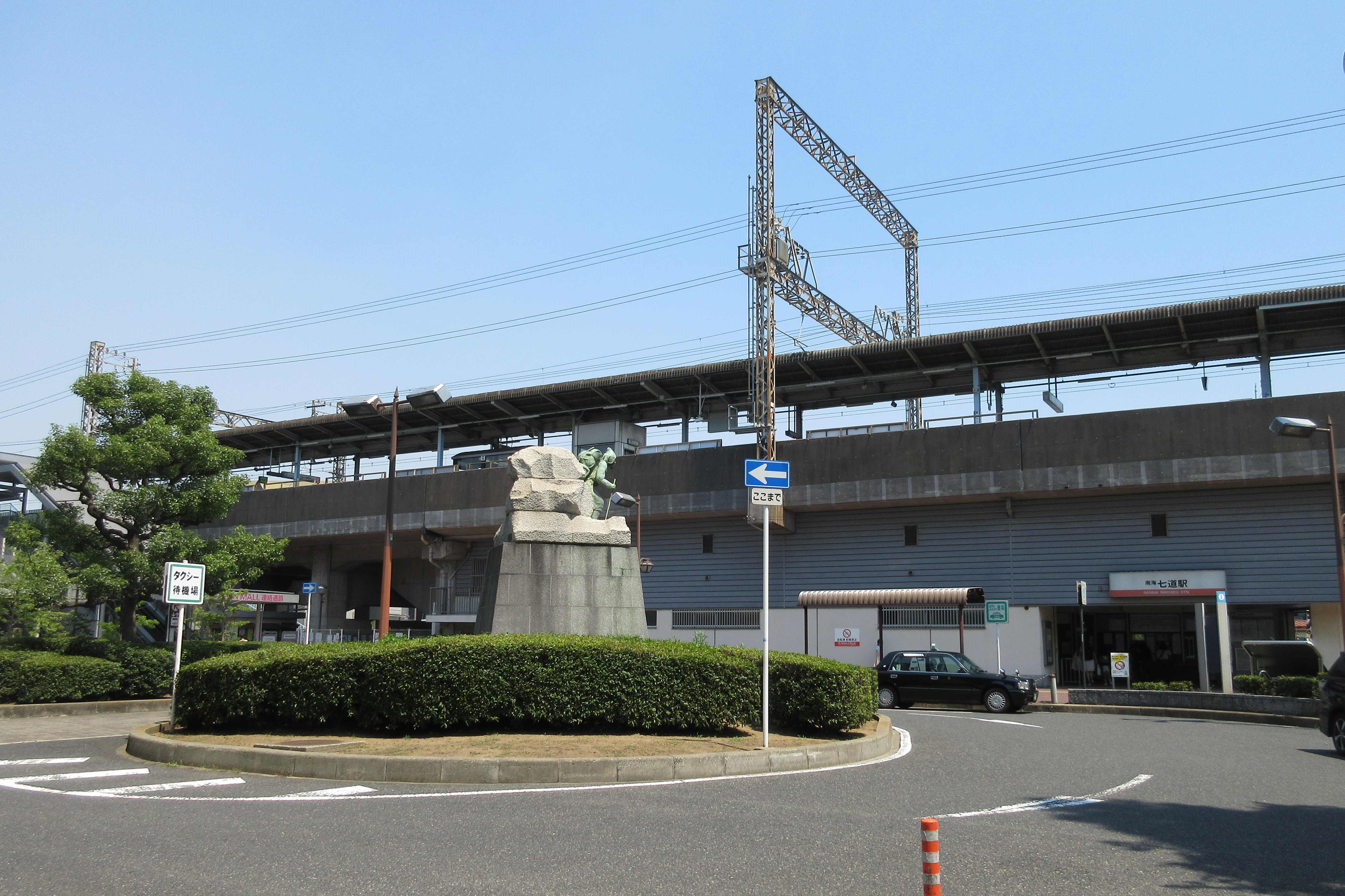 南海電鉄七道駅